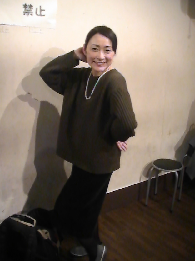 鈴木奈都 (2016年2月23日)